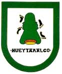 Esta imagen es el escudo del municipio de hueytamalco puebla.